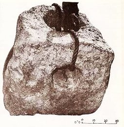 משקולות בצורת "טי"